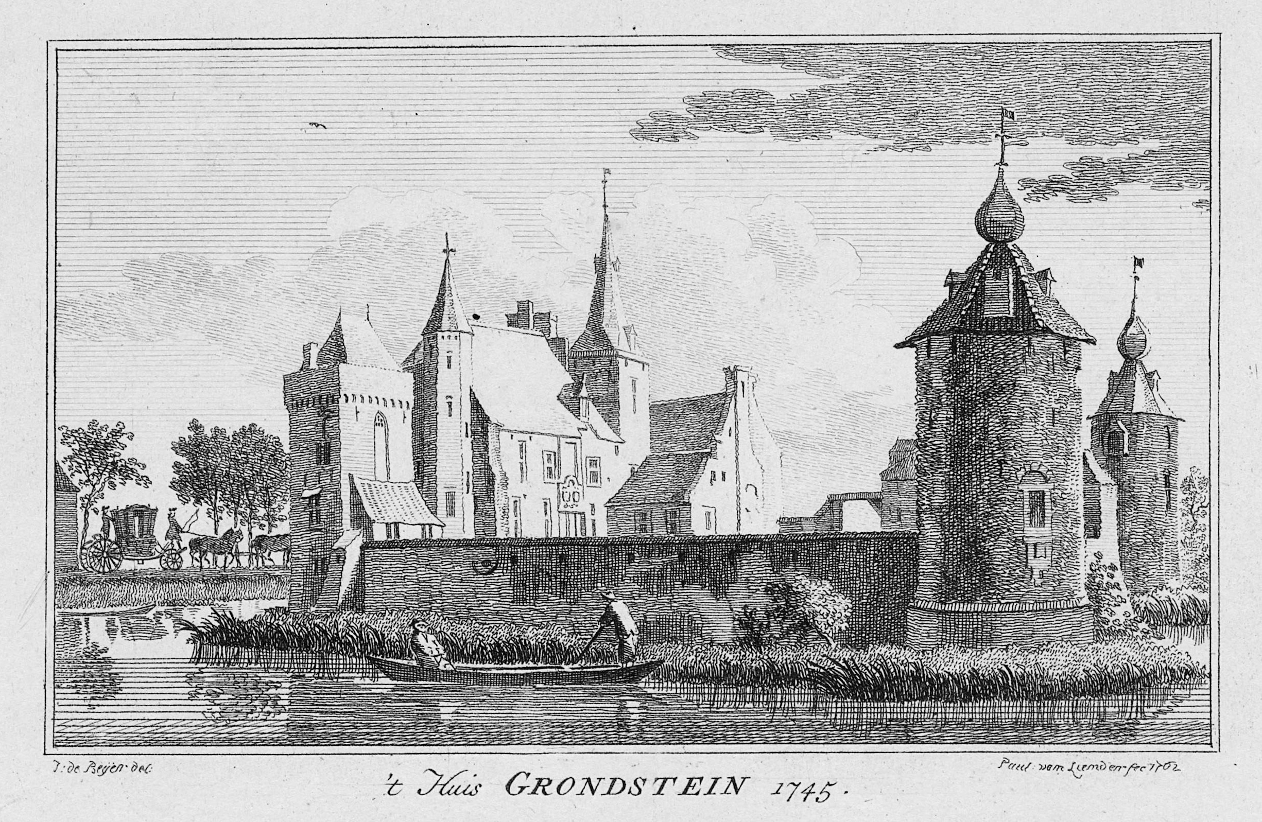 Haus Grondstein nach Jan de Beyer, 1745